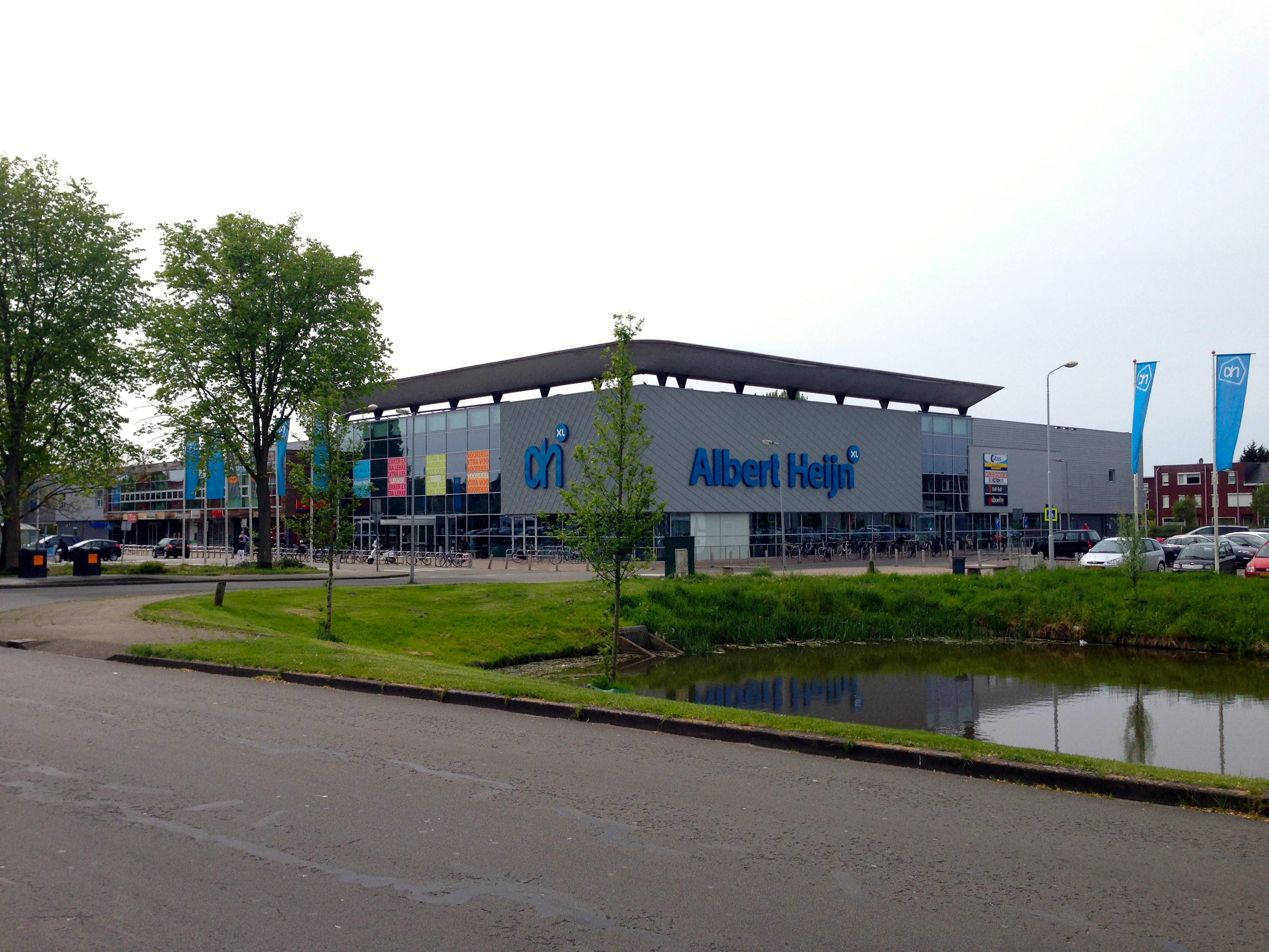 De Albert Heijn aan de Wendelaarstraat Alkmaar. WInkelcentrum gestart door de Grosmarkt, met Wastora als belangrijke huurder in de jaren 1970-1980. Halverwege jaren 90 vestiging van een Albert Heijn XL